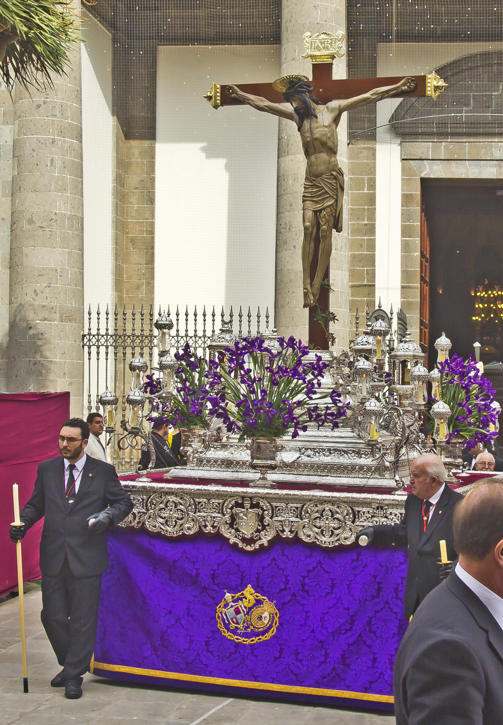 Paso del Santísimo Cristo de La Laguna